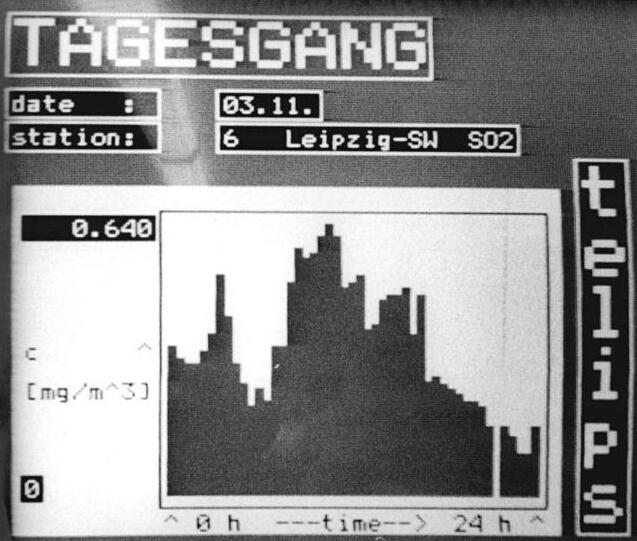 Leipzig, Grafik zur Luftbelastung ADN-ZB Grubitzsch 13.11.89 Leipzig: Umweltdaten - Aktuelle Tageskarten zur Luftbelastung mit Schwefeldioxid werden in der Bezirkszentrale des lufthygienischen Überwachungssystems im Bezirkshygieneinstitut Leipzig ermittelt. Alle 30 Minuten laufen hier Daten von 14 Meßstationen des Bezirkes zusammen. Zwecks Vergleichbarkeit mit den zulässigen Maximalkonztrationen werden die aktuellen Werte ohne Zuhilfenahme meteorologischer Daten in einer Kombination von automatischen Messungen und Kürzestfrist-Immissionsprognosen erstellt. Seit Monatsbeginn werden die Daten jede Woche veröffentlicht. - siehe auch 1989-1113-1N und 2N.